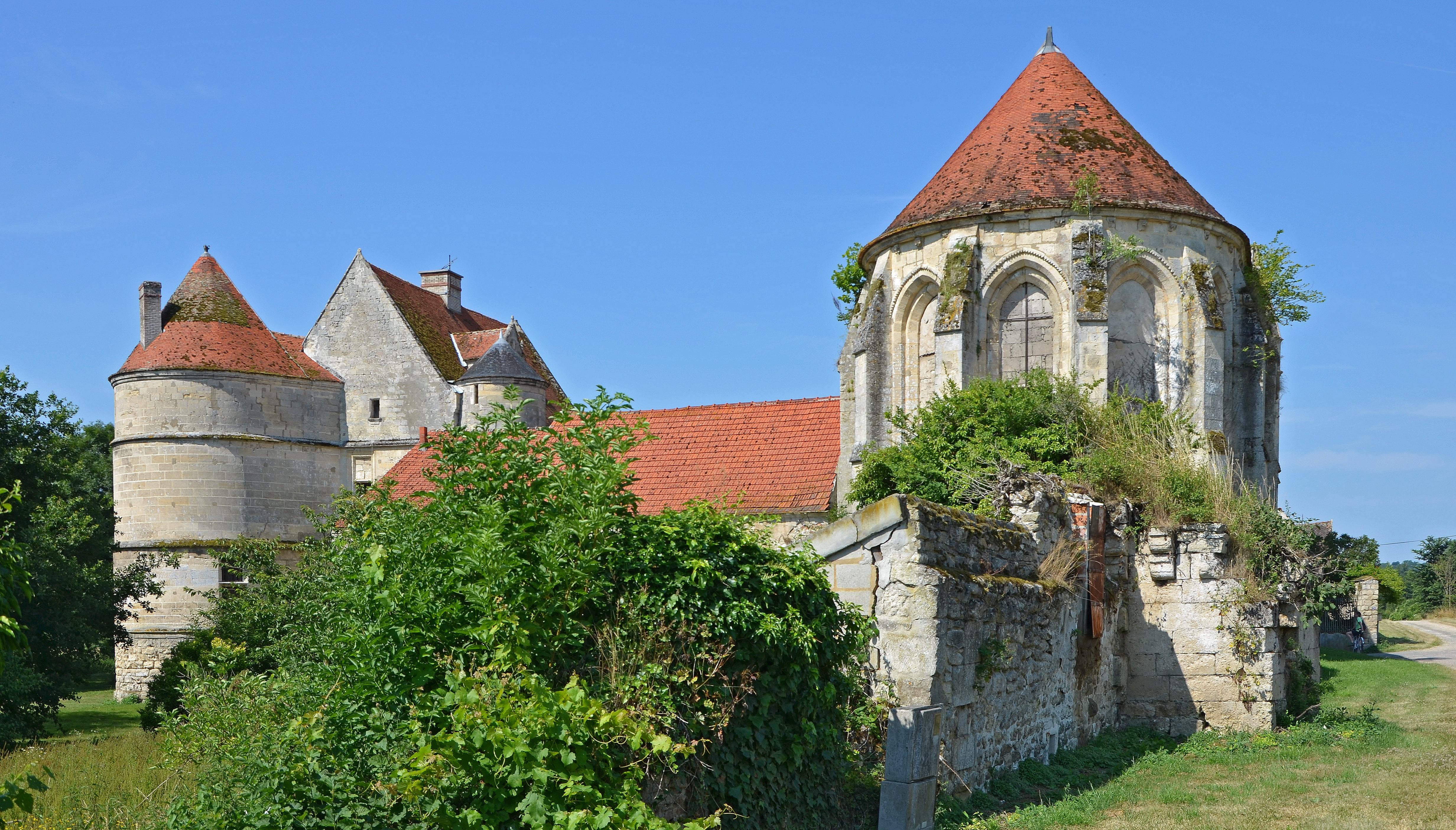 Commanderie de Moisy à Montigny-l'Allier, Aisne, France .